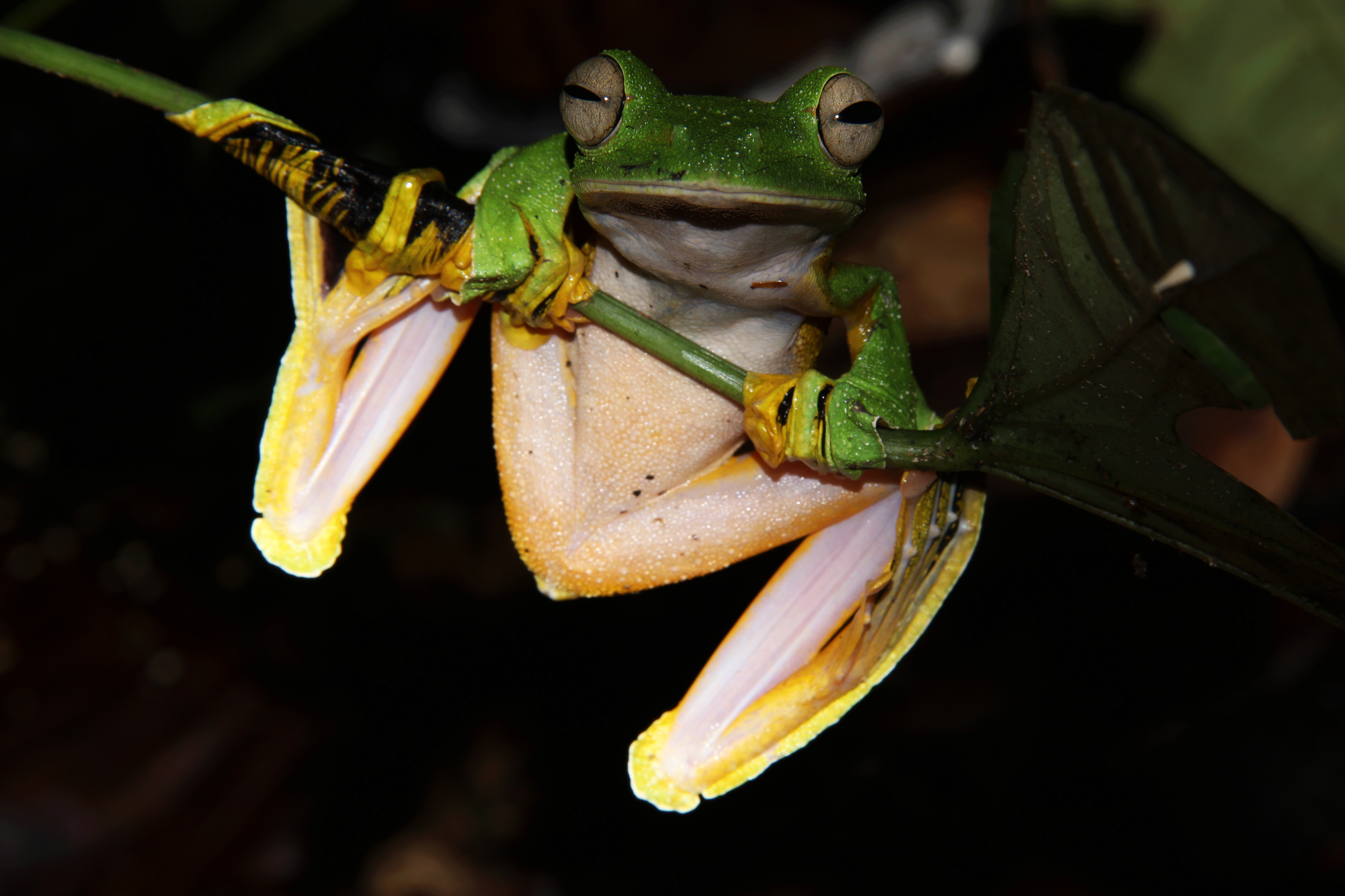 ปาดเขียวตีนดำ (Wallace’s Tree Frog) Rhacophorus nigropalmatus